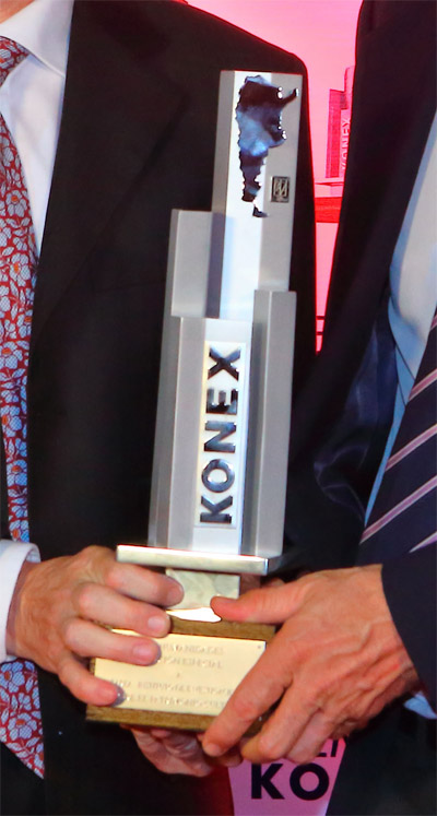 Trofeo de los Premios Konex otorgados por la Fundación Konex.